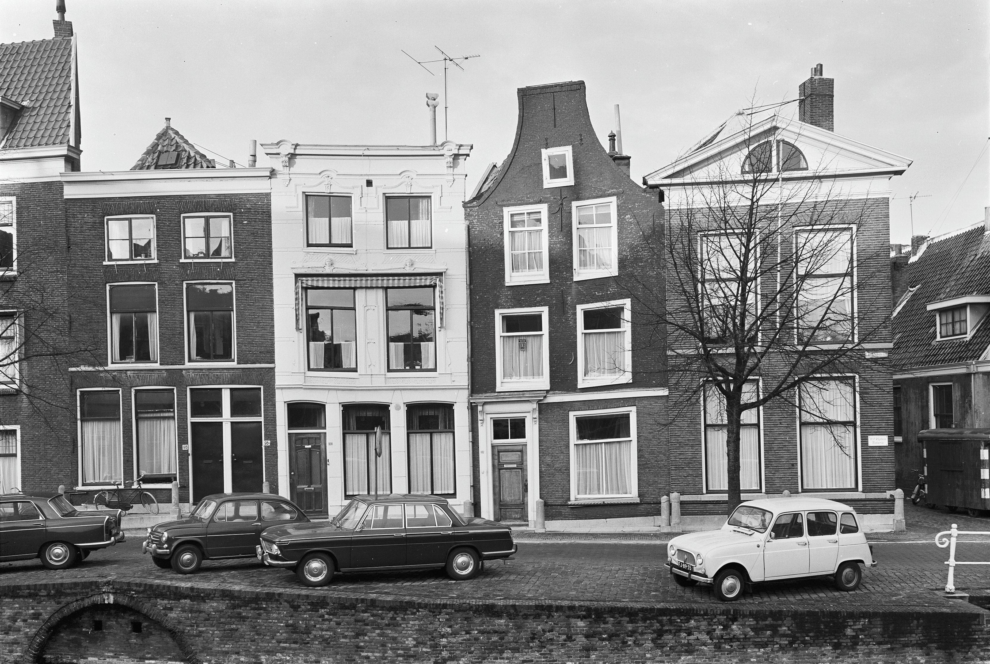 voorgevel